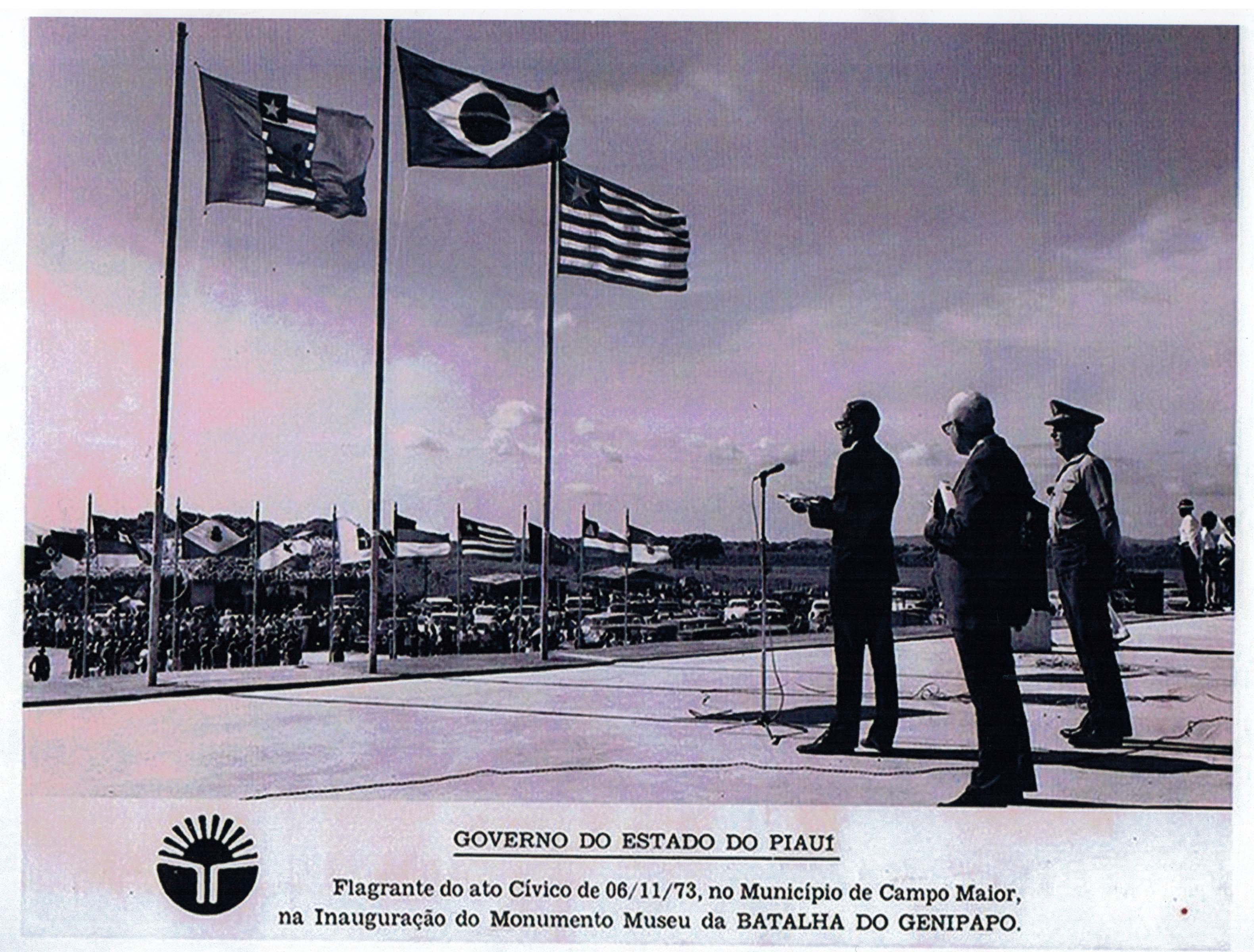 Fotografia que mostra o governador do Piauí, Alberto Silva e o historiador Monsenhor Chaves na cerimônia de inauguração do monumento da Batalha do Jenipapo em 1973. Jenipapo aparece escrito com "G" porque na época ainda se utilizava tal grafia. Tremulam as bandieras do Brasil, do Piauí e a antiga bandeira de Campo Maior.